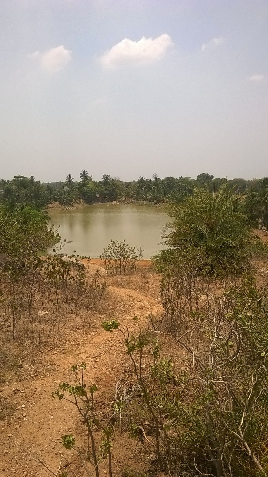 ఈదులవలస చెరువు (మోడల్ స్కూలు నుండి దృశ్యం)